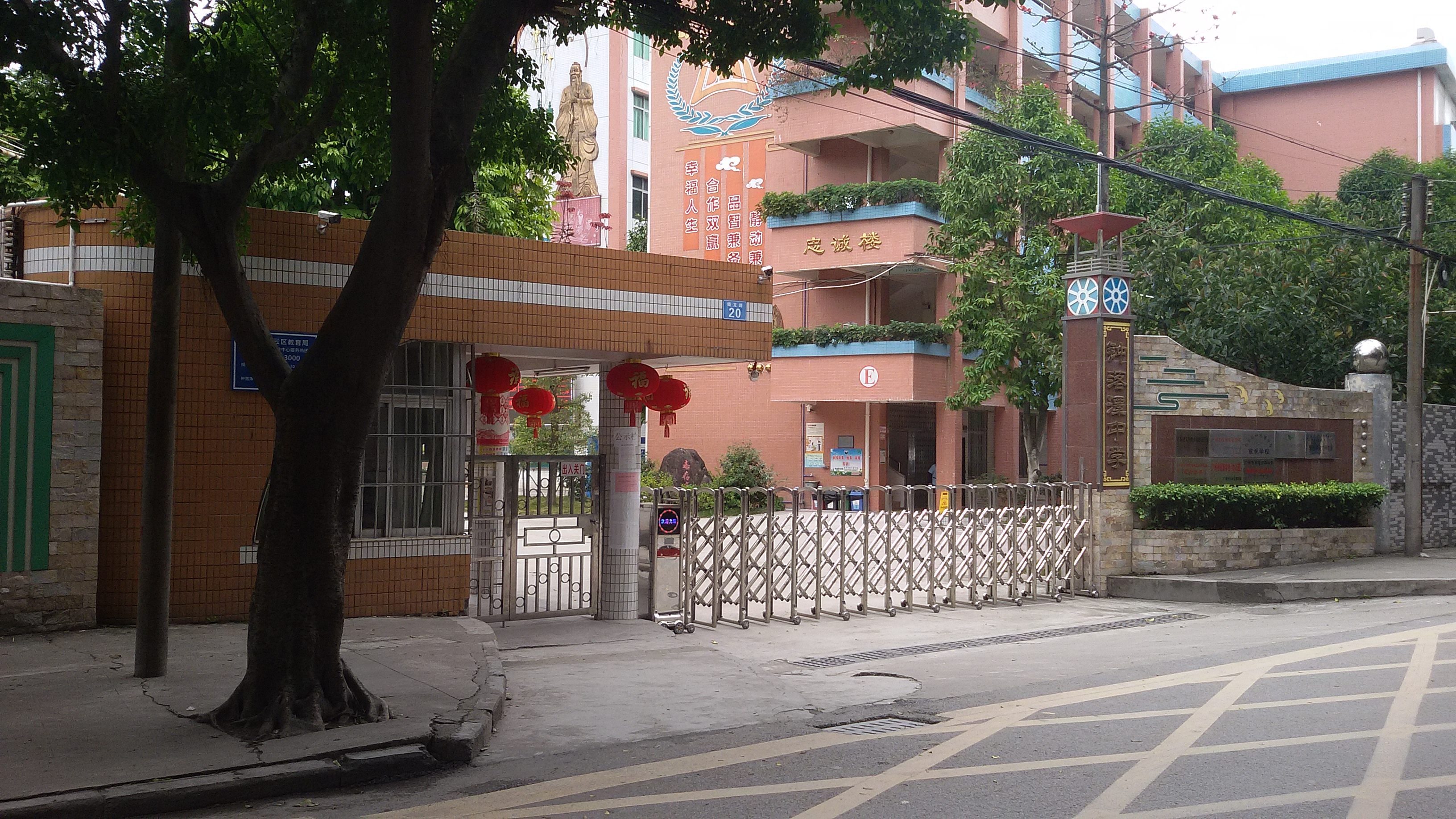 粵語: 鐘落潭中學正门